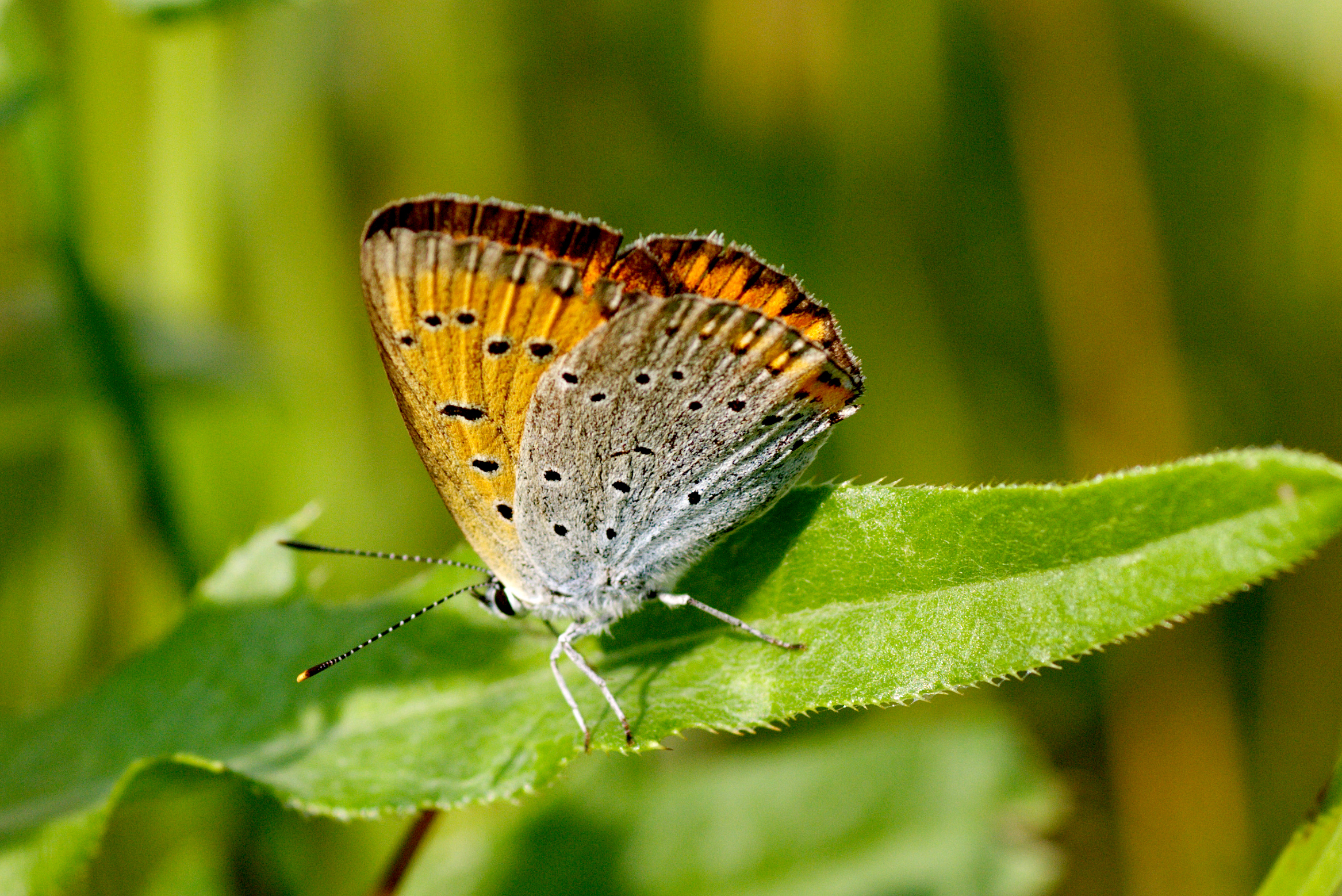 Suur-kuldtiib Põlvamaal